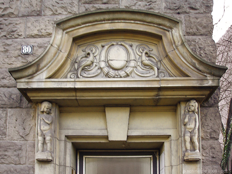 Portalschmuck am Gebäude Südstraße 80 in Heilbronn